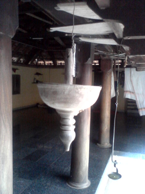 ഭസ്മക്കോട്ട